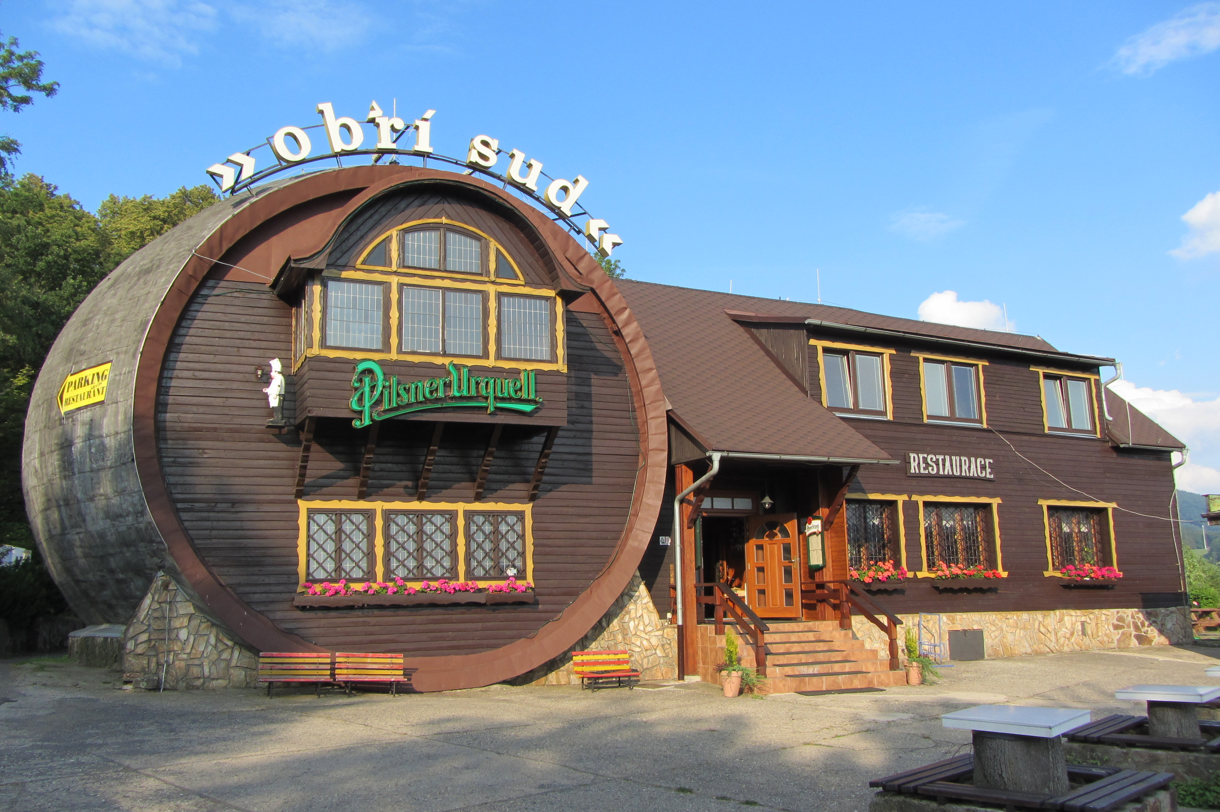 Pohled od západu na restauraci Obří sud severně od Lázní Libverda.